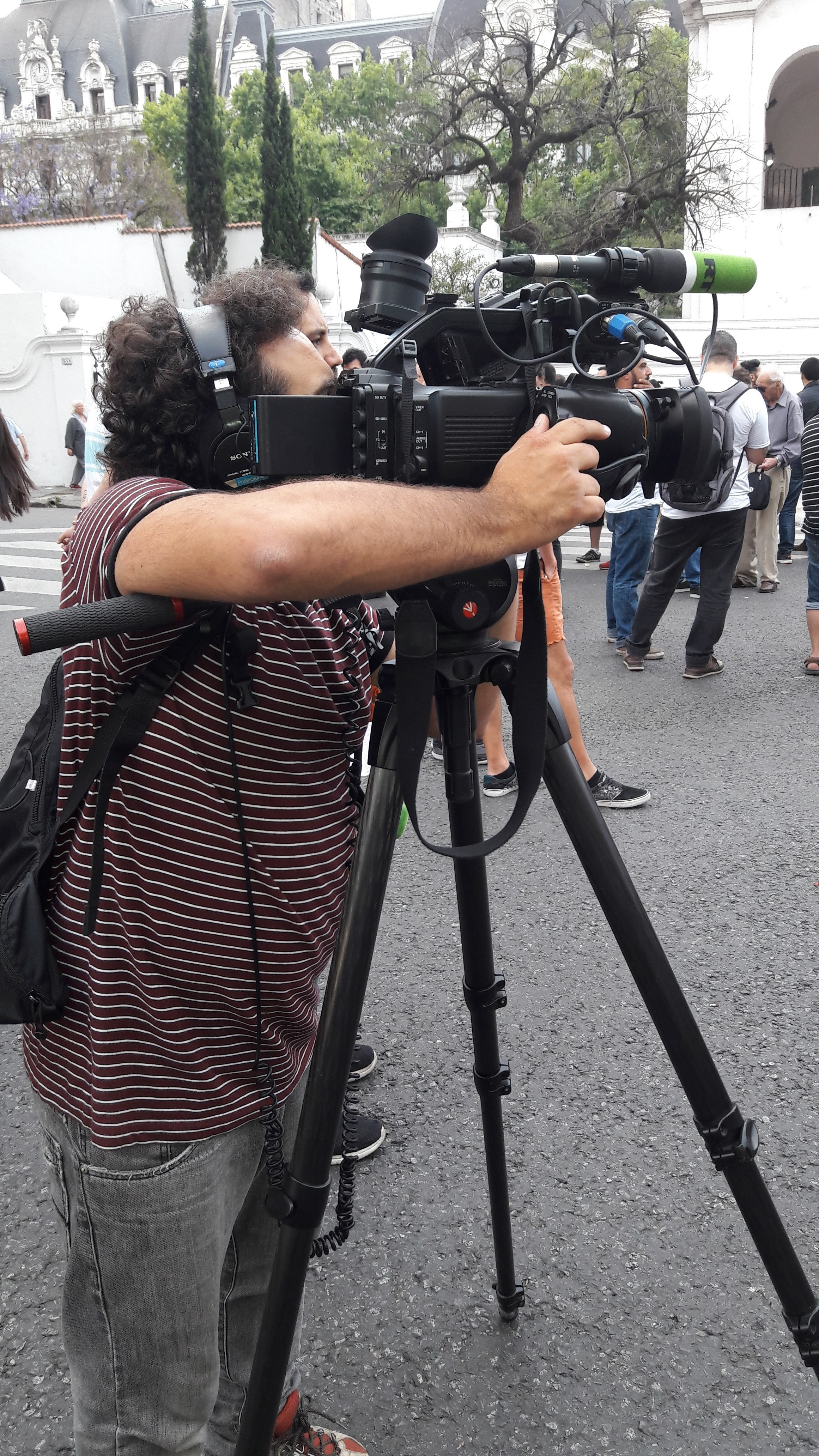 Corresponsal de RT en Español en Buenos Aires, Argentina, cubriendo la Marcha de la Resistencia de 2017.